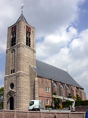 Eigen werk